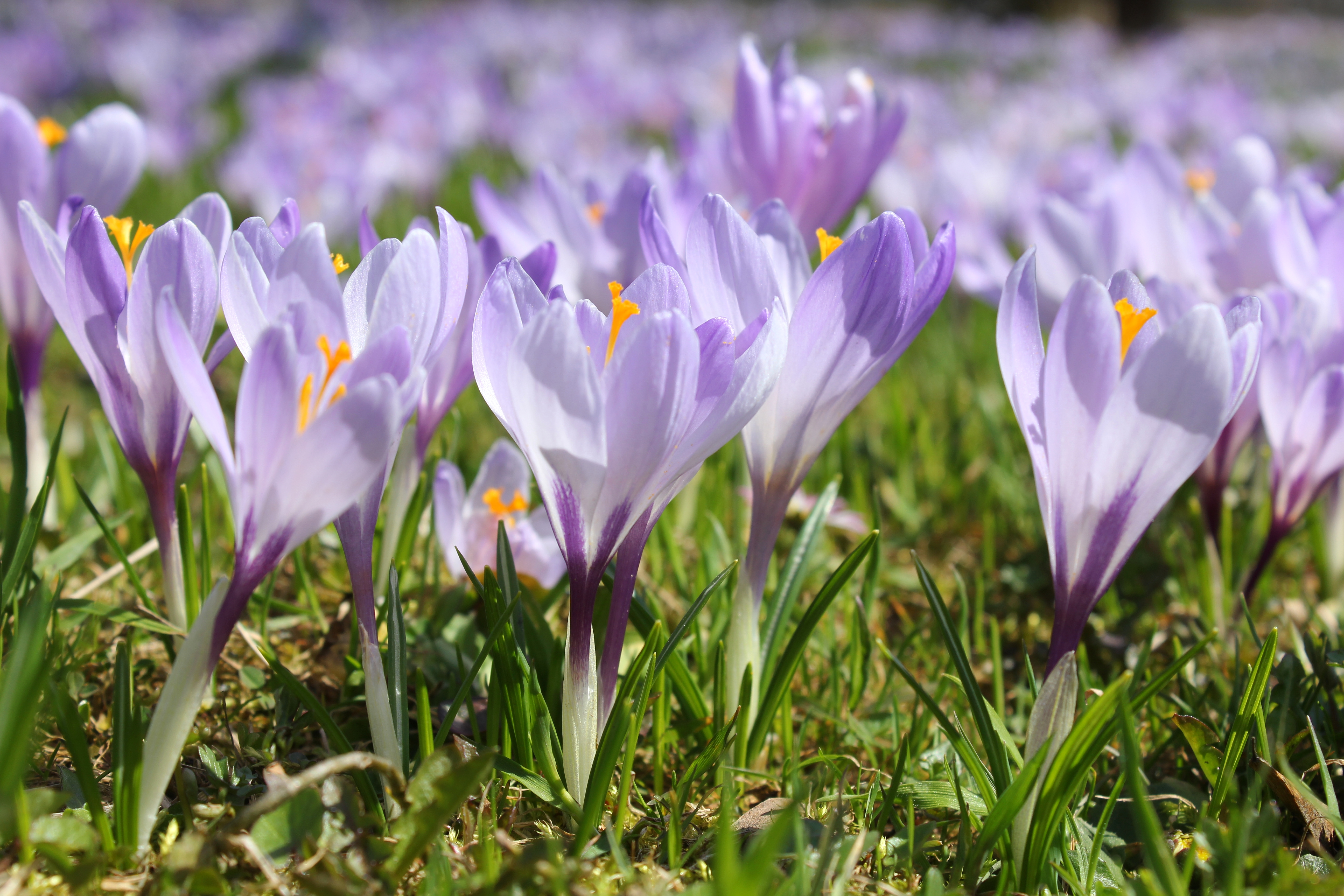 Flächen-Naturdenkmal Drebacher Krokuswiesen, 09430 Drebach, Erzgebirgskreis, Sachsen. – Jedes Jahr zwischen Anfang März bis Ende April können Sie in Drebach ein einzigartiges Naturerlebnis bewundern, die Krokusblüte. Es gibt in Drebach über 40 Flächennaturdenkmale mit insgesamt ca. 7 ha, auf denen die wild wachsenden violetten Drebacher Frühlingskrokusse, auch "Nackte Jungfern" genannt, angesiedelt sind.